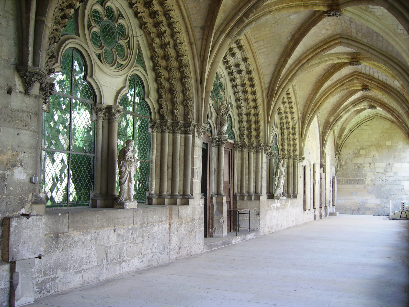 Cloître lumineux et statues